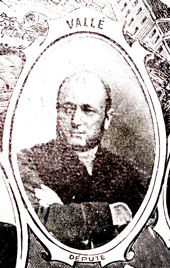 portrait de politiciens de la région.